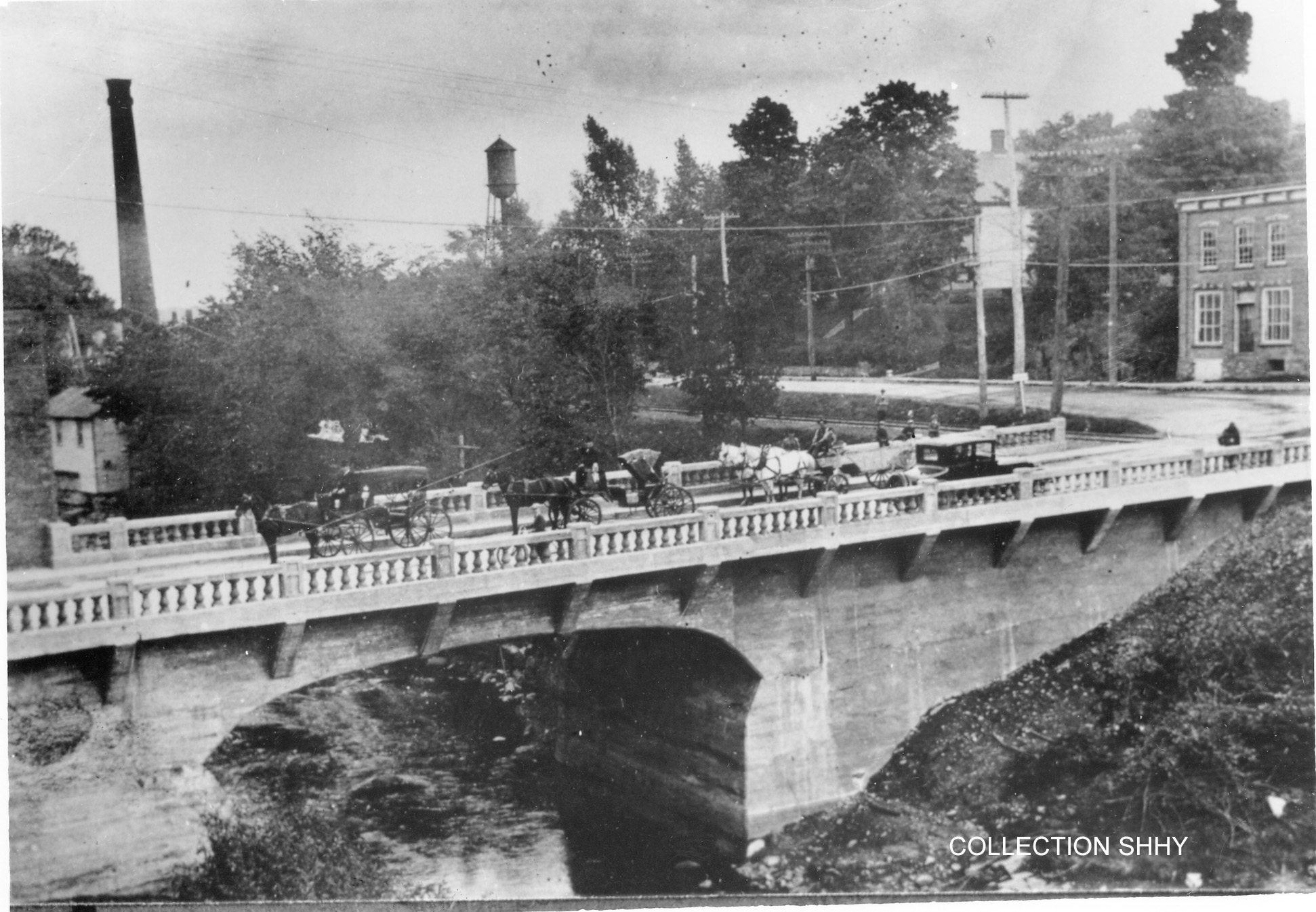 Pont de la rue Principale à Granby. Le premier pont en béton construit en 1925. Plus tard connu sous le nom de pont Mountain puis pont Patrick-Hackett.